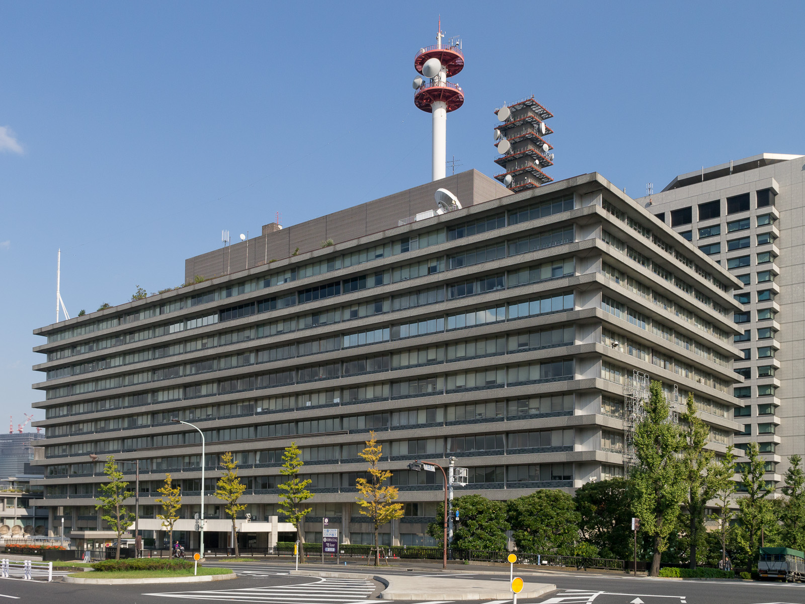 中央合同庁舎3号館、国土交通省など。東京都千代田区霞が関。